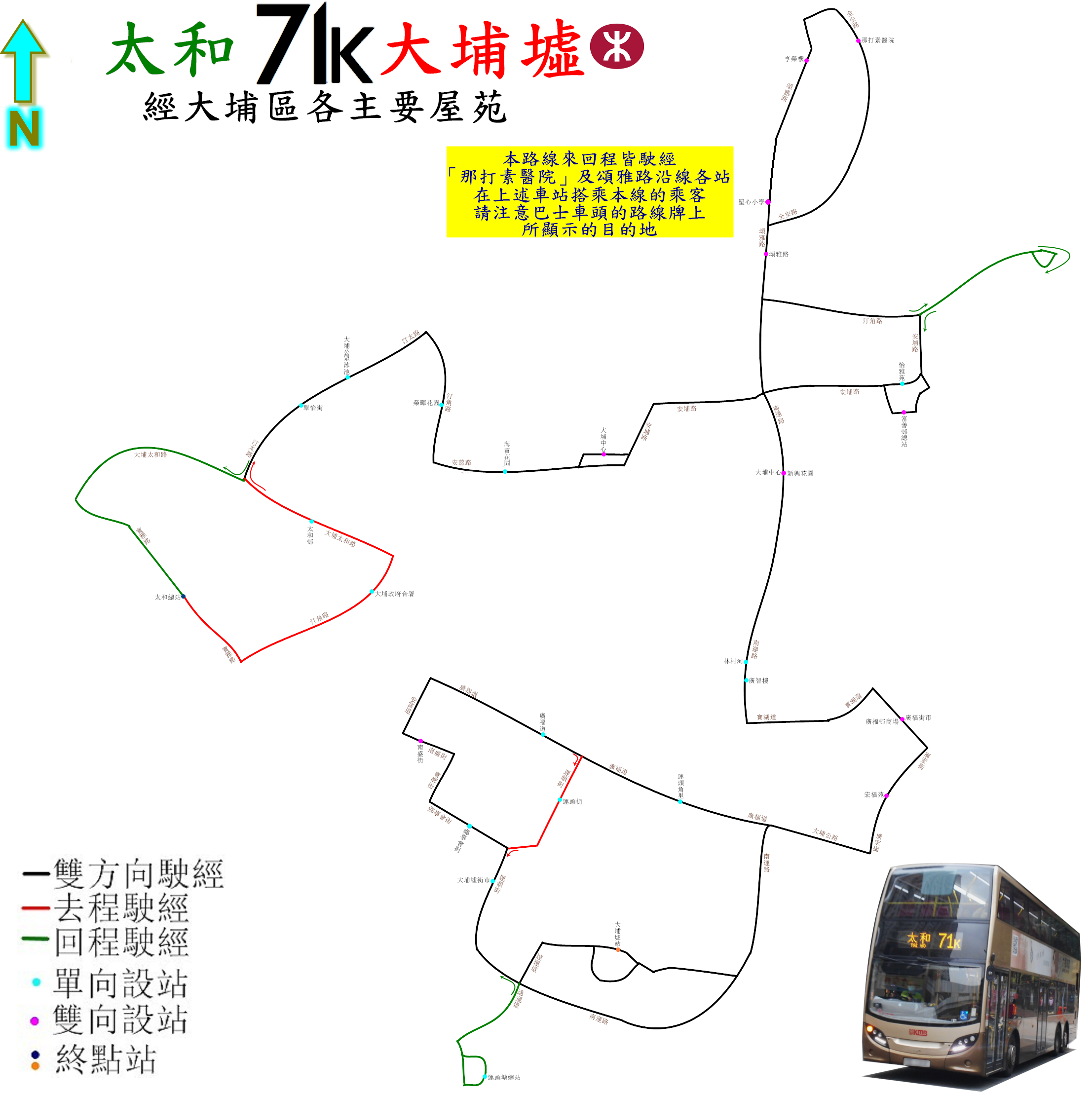 中文（香港）: 九巴71K線的走線圖，走線十分複雜